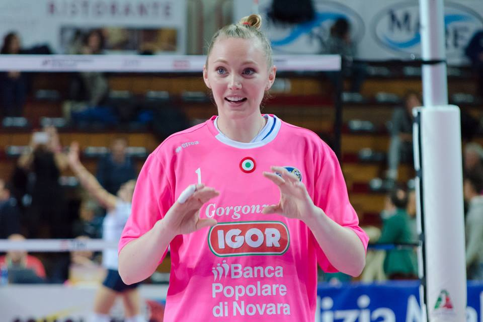 Pallavolista statunitense, gioca nel ruolo di schiacciatrice